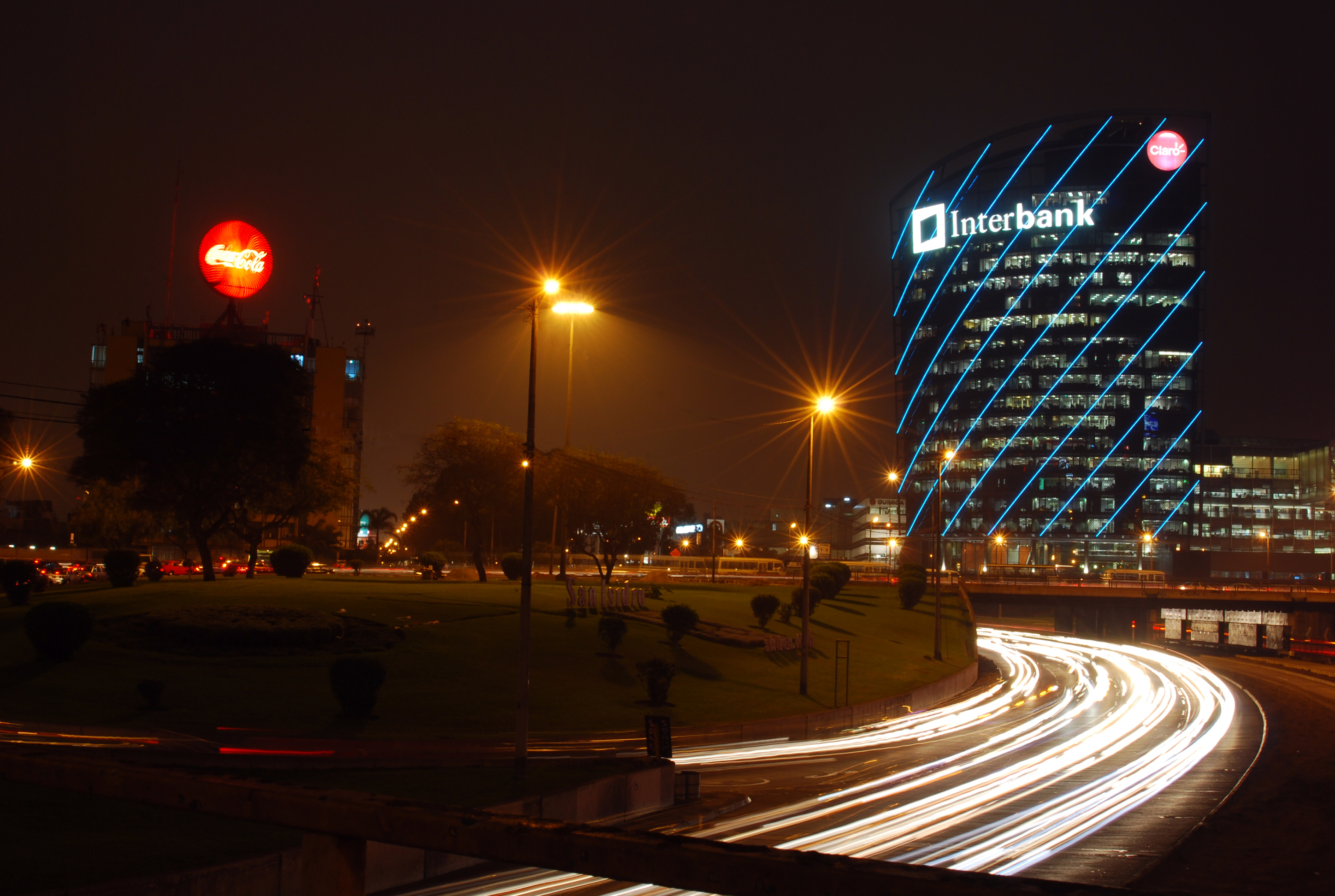 Torre Interbank en Lima, Perú